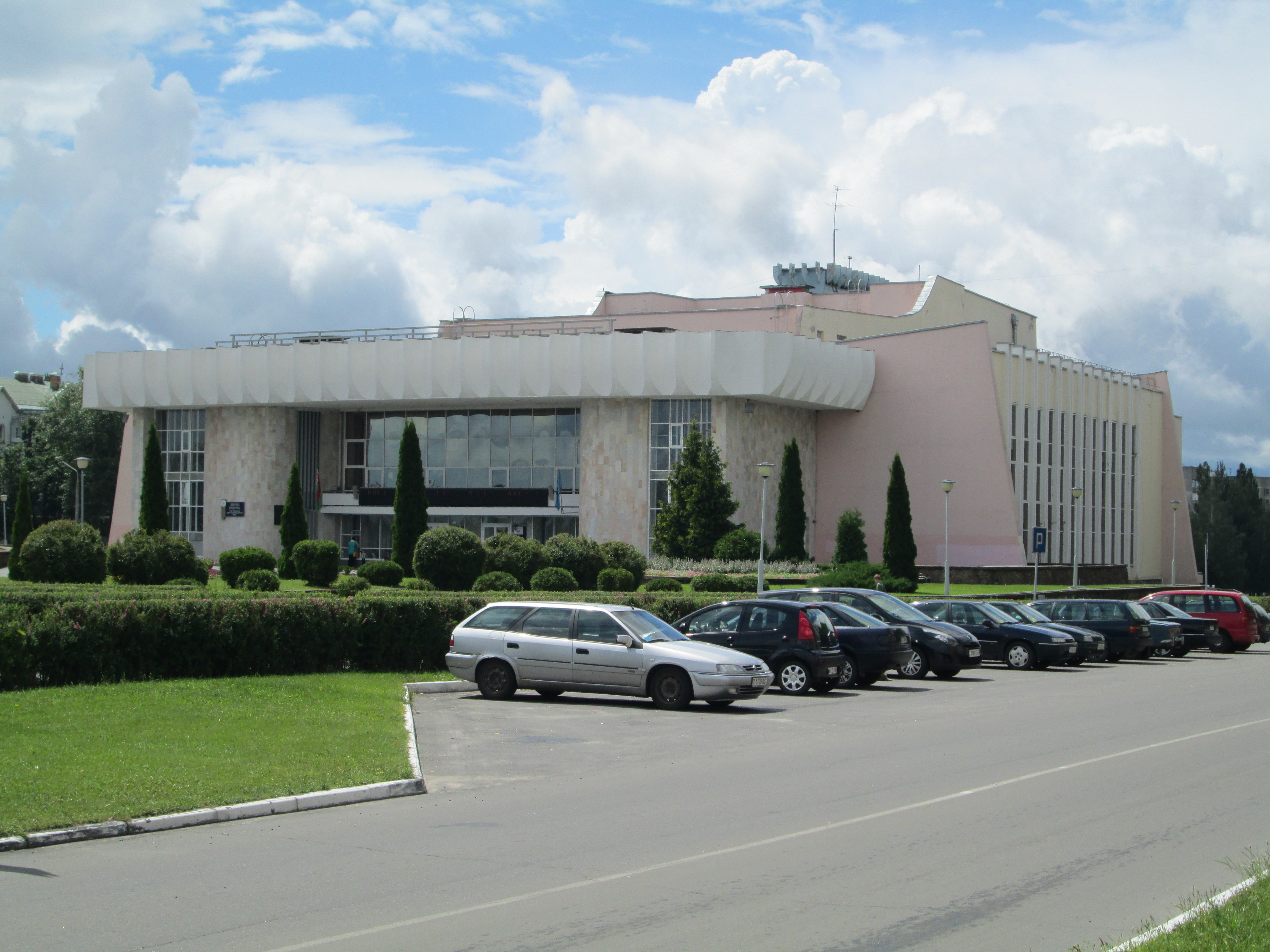 Mazyr, Belarus